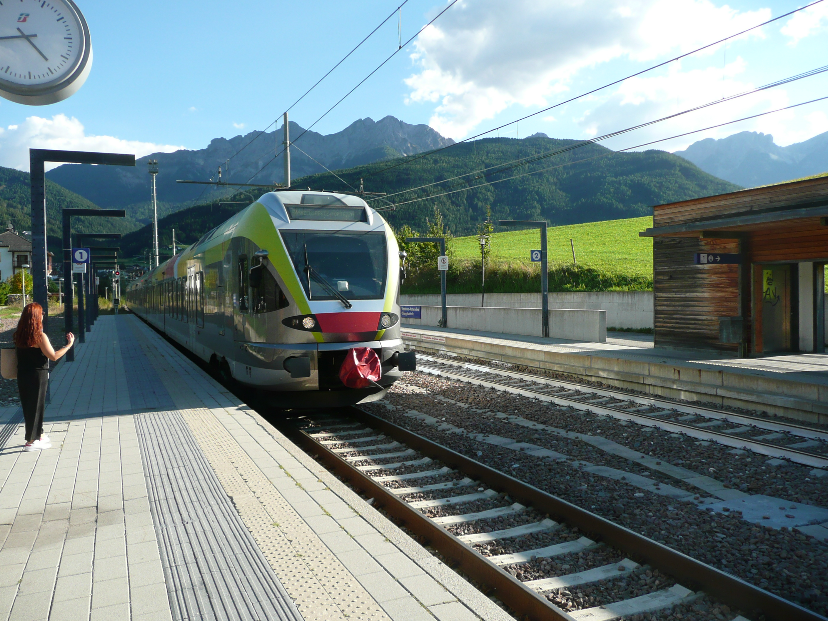 Stadler Flirt der Südtirolbahnen in der Station Olang-Antholz